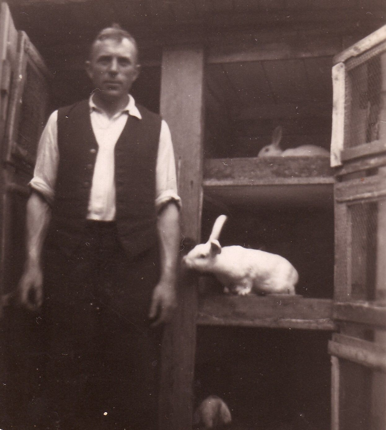 Ein erzgebirgischer Züchter der Kaninchenrasse Weiße Wiener in Schönheide. Wu de Hasen Hos'n haaß'n un' de Hosen Hus'n, do bie iech dorrhamm.